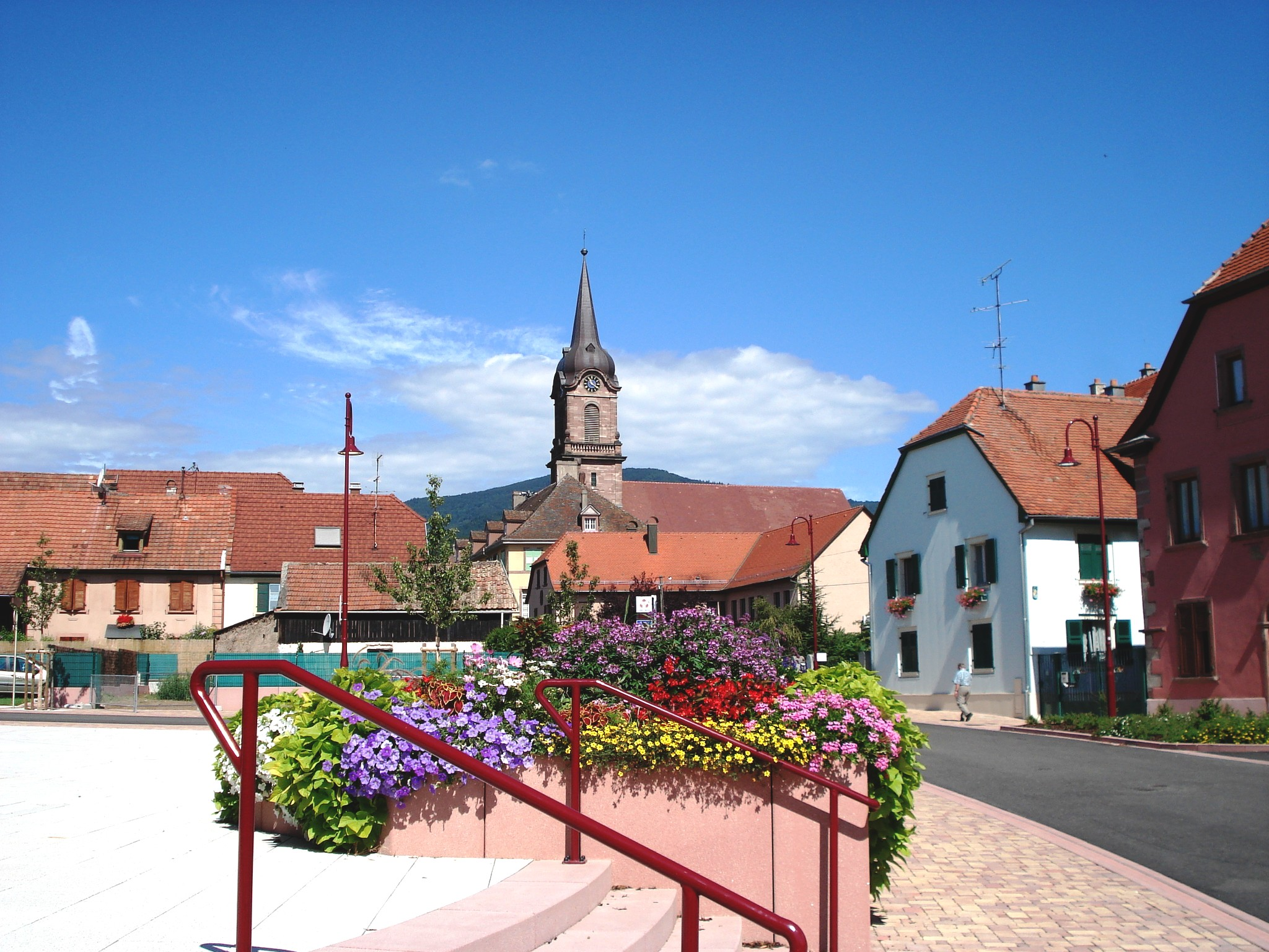 Uffholtz Vue centrale en juillet 2010